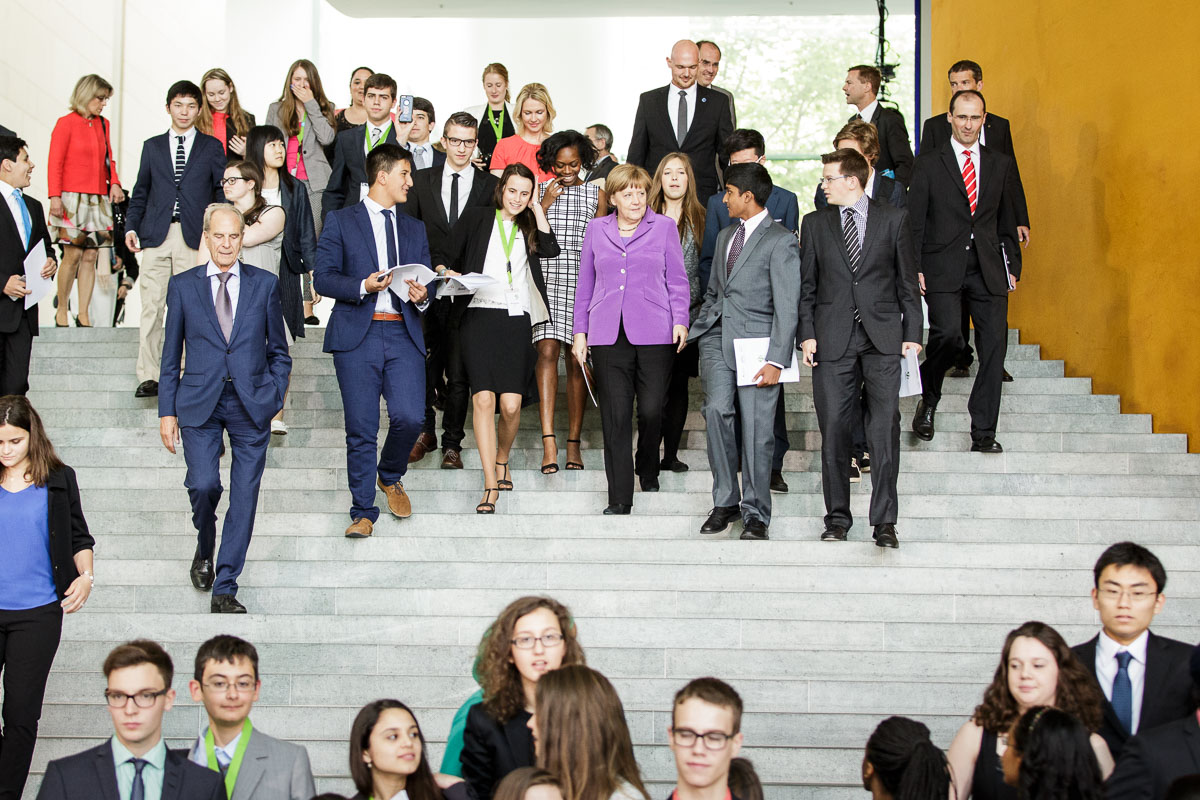 Participants du J7 2015 à Berlin à la Chancellerie Allemande Photo: Bundesregierung/Denzel